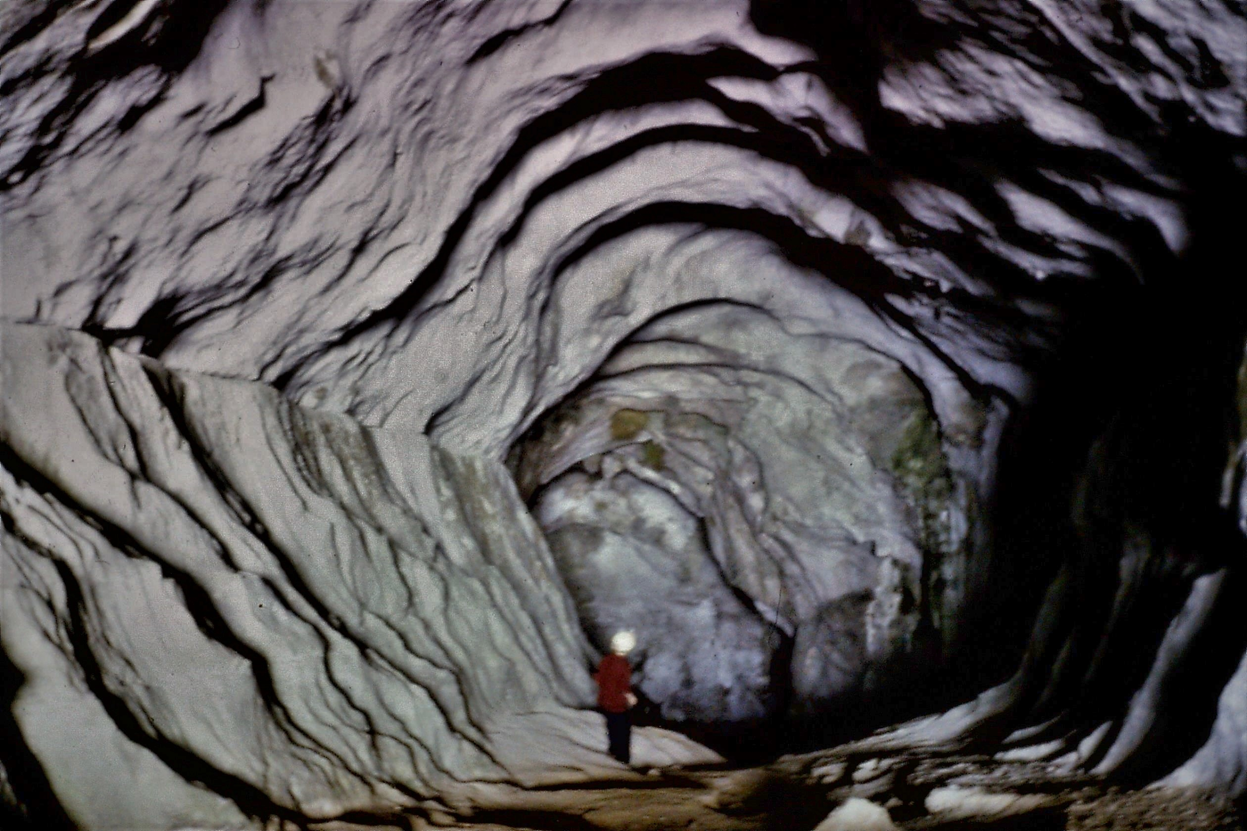 Tunnel d'entrée de la grotte Favot.